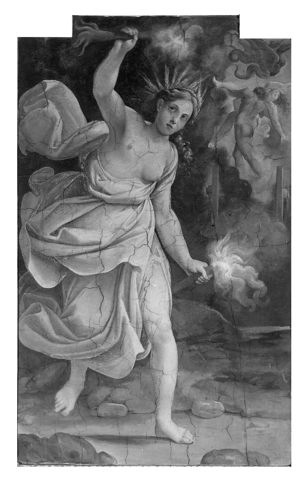 Cerere alla rierca di Proserpina